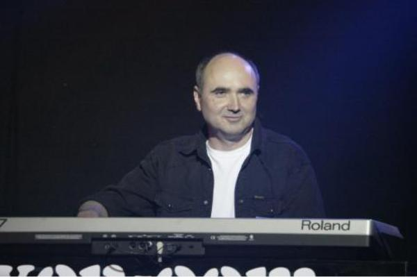 Keyboarder Wolfgang Kob